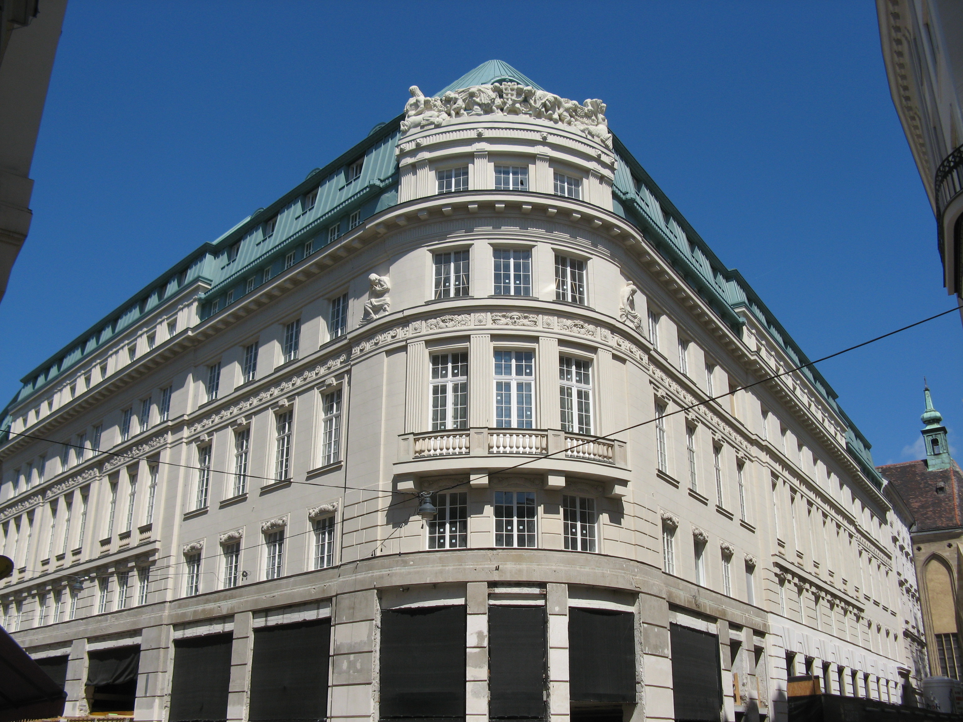 Ehemalige Länderbank (1913-1915) von Ernst Gotthilf-Miskolczy und Alexander Neumann, Bognergasse 4, Wien-Innere Stadt